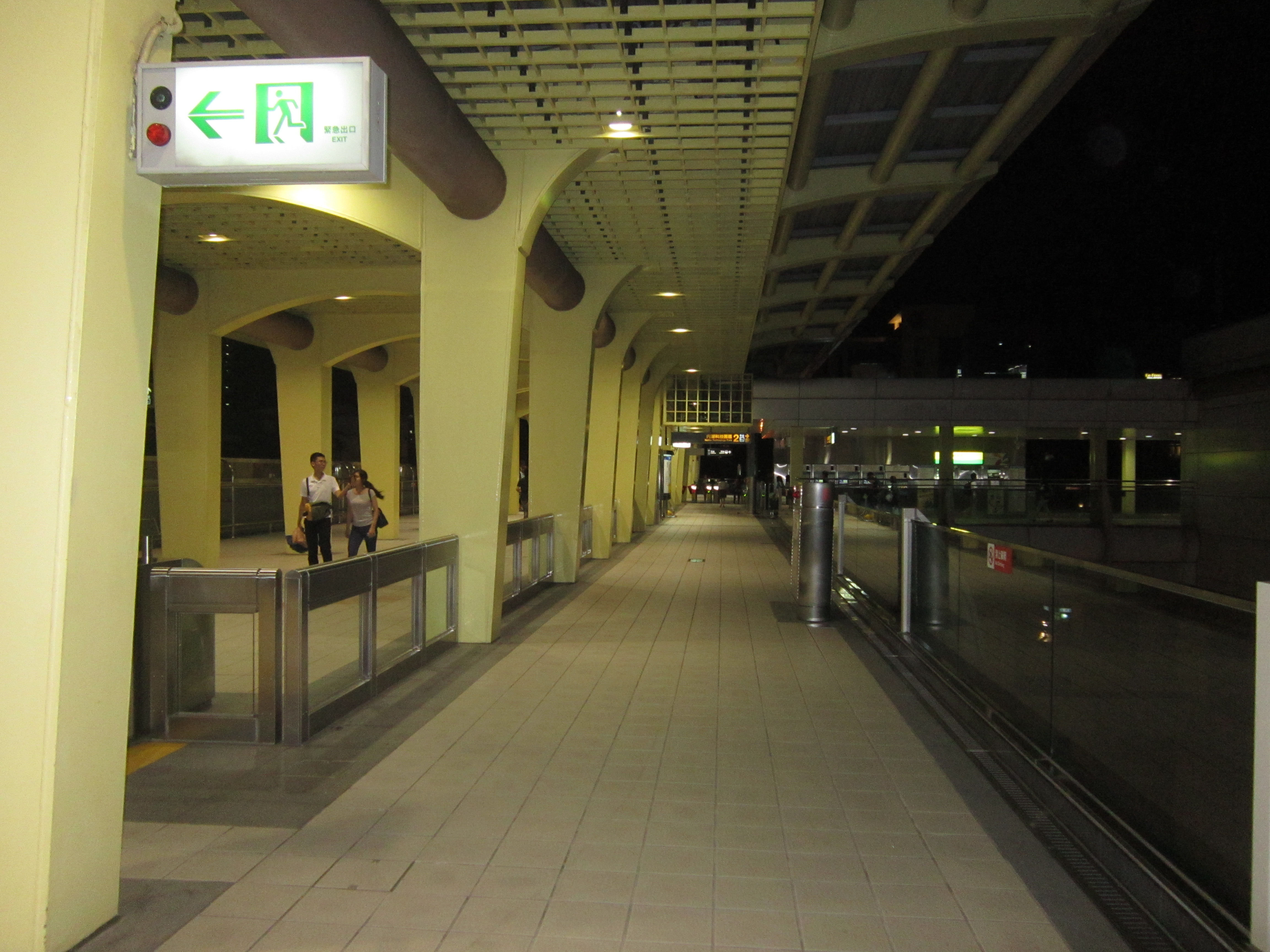 西湖捷運站空中通廊